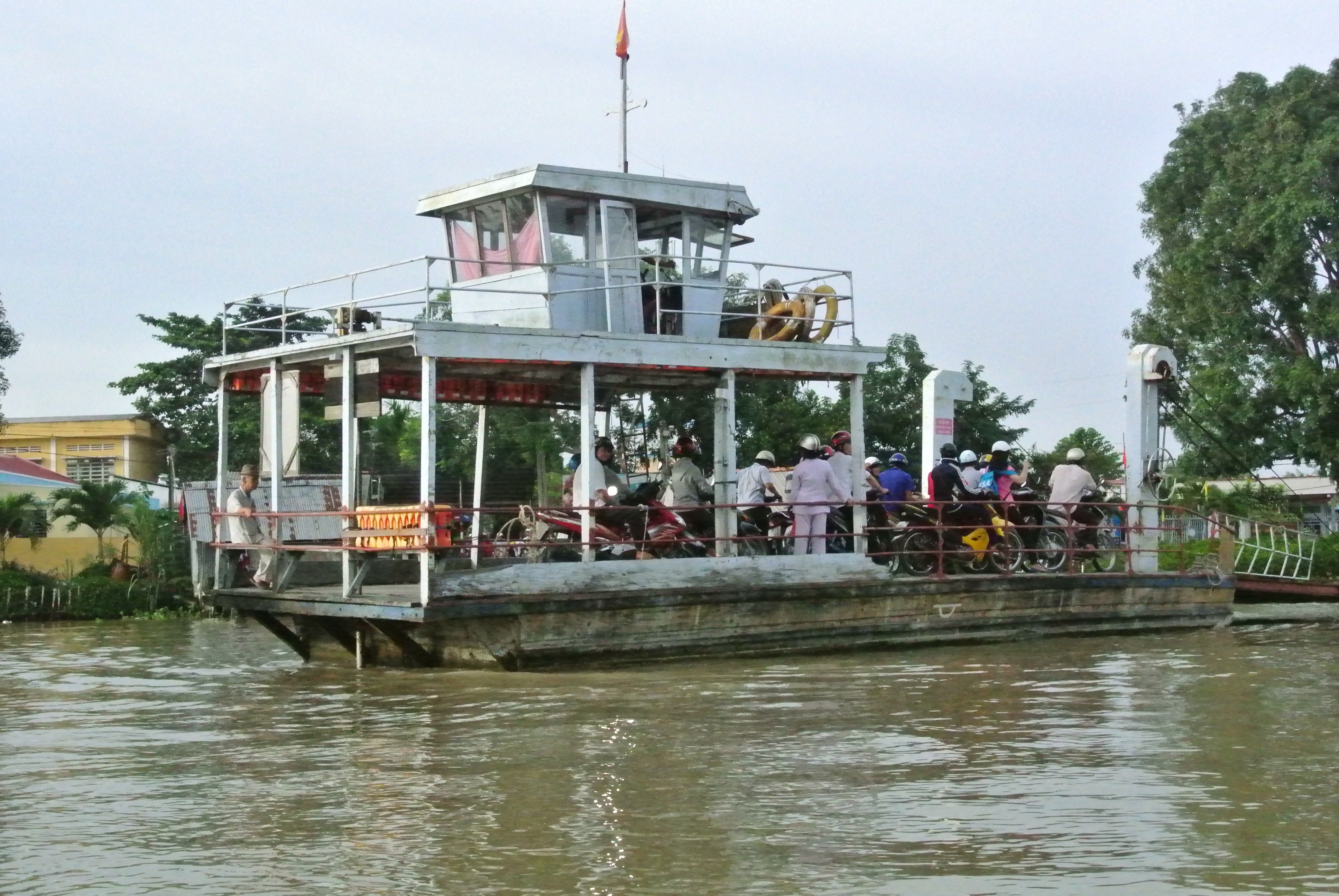 メコンデルタの典型的な渡し船。ベトナム、カントーにて